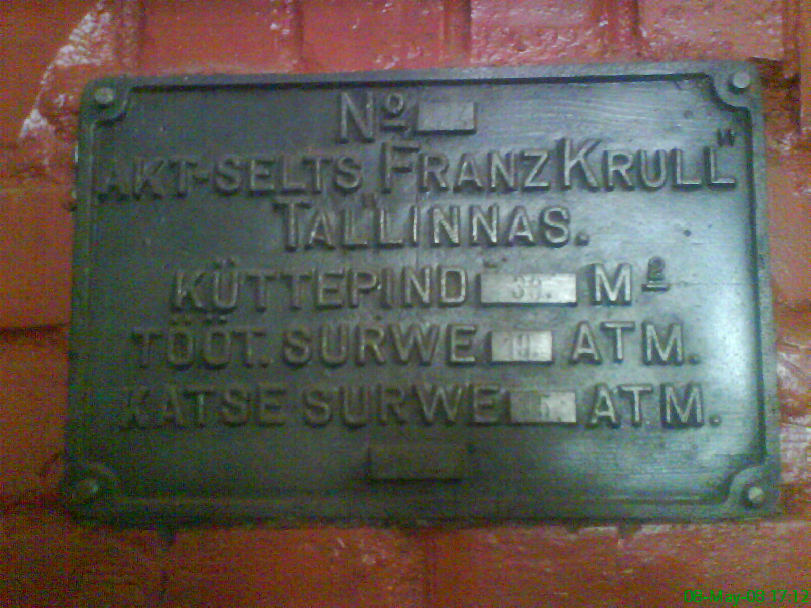 Franz Krulli aurukatel, silt tehniliste näitajatega. Imavere piimandusmuuseum